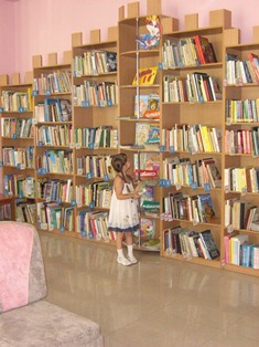 У залі для молодших читачів Херсонської обласної бібліотеки для дітей.